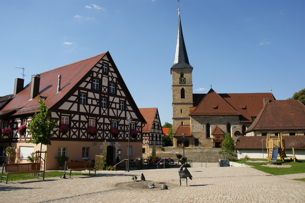 Kirchröttenbach